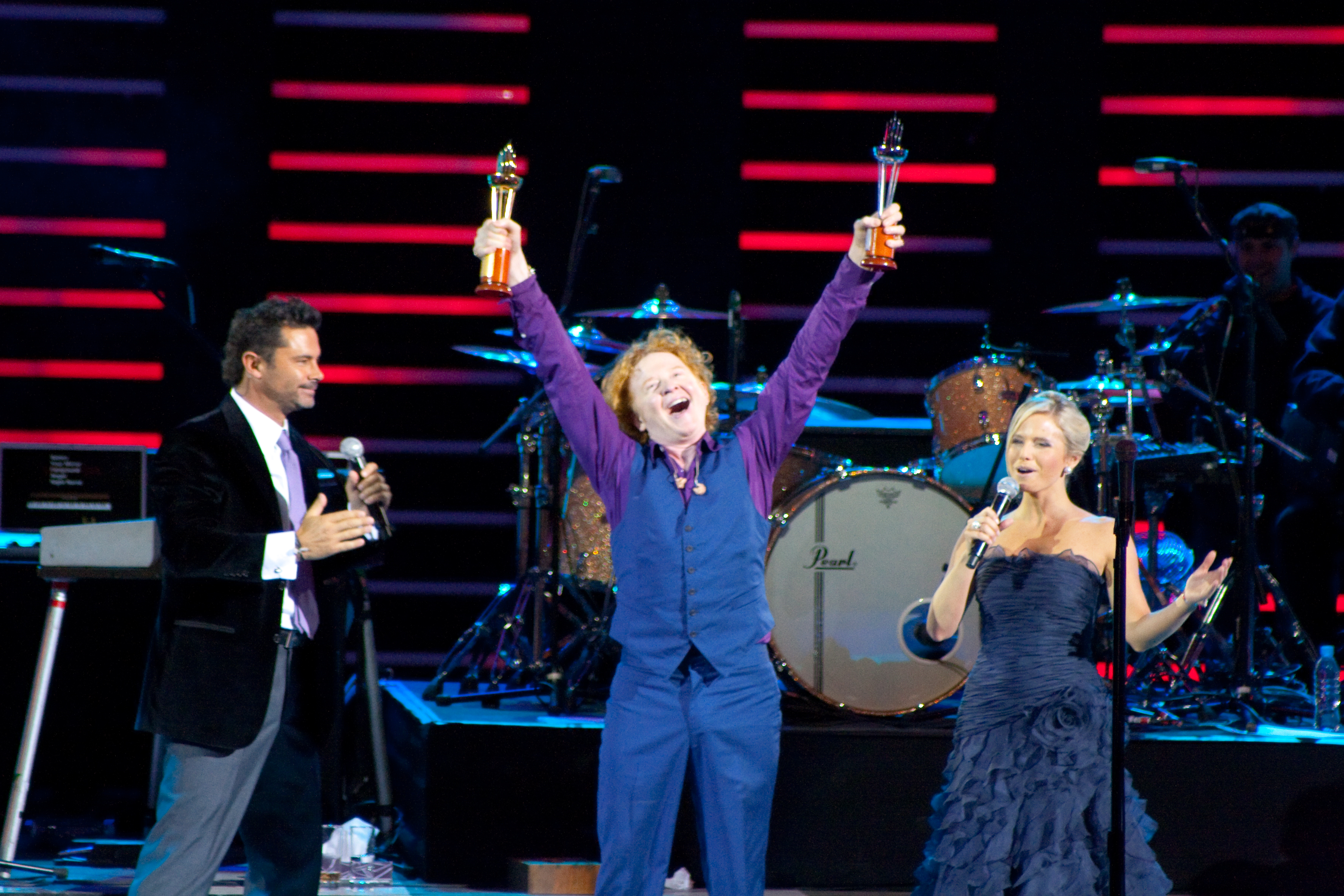 Simply Red - Antorcha de Plata y Oro